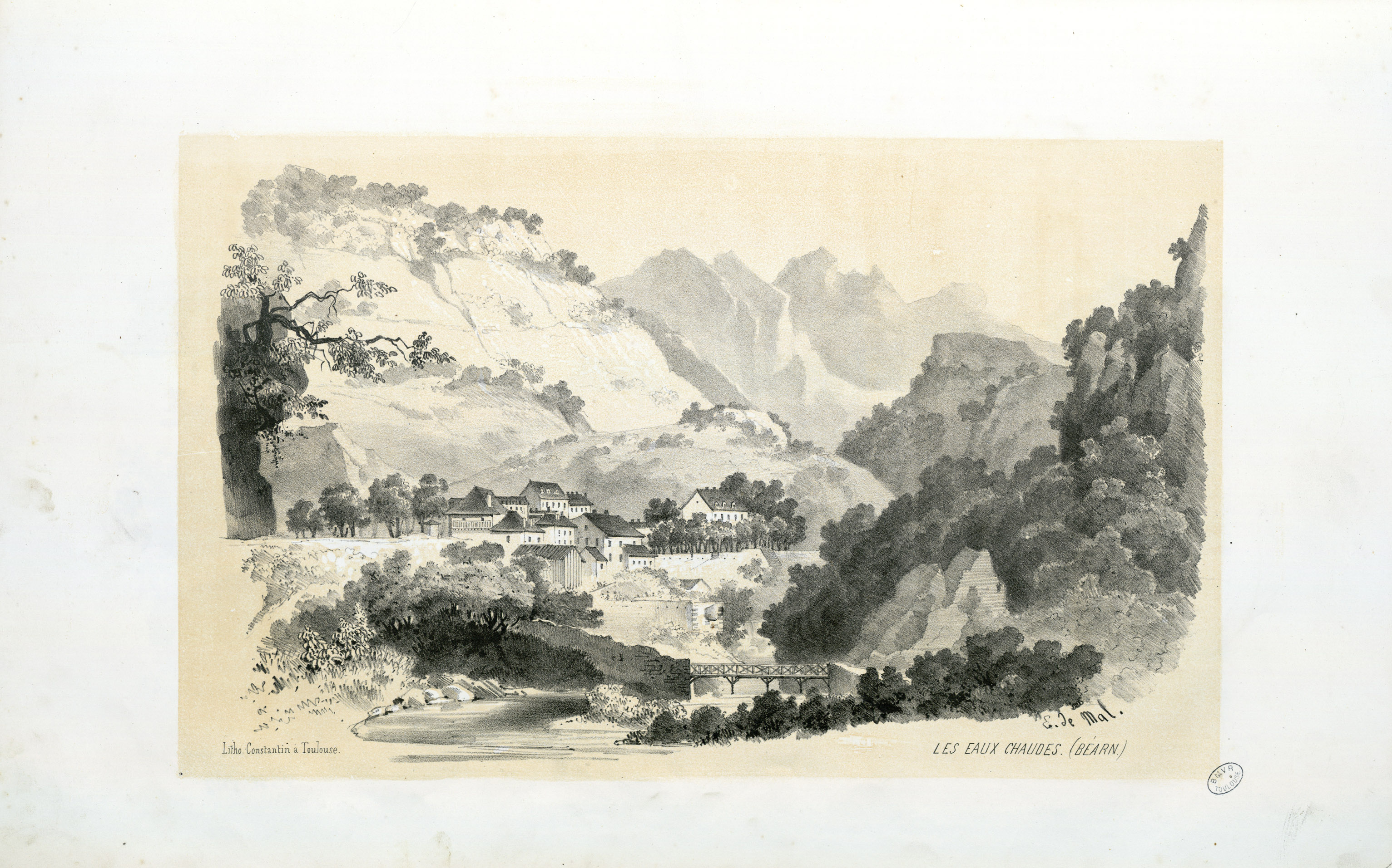 Fait partie d'un recueil de 15 planches lithographiées en camaïeu avec titre lithographié Ancely, René (1876 - 1966). Possesseur